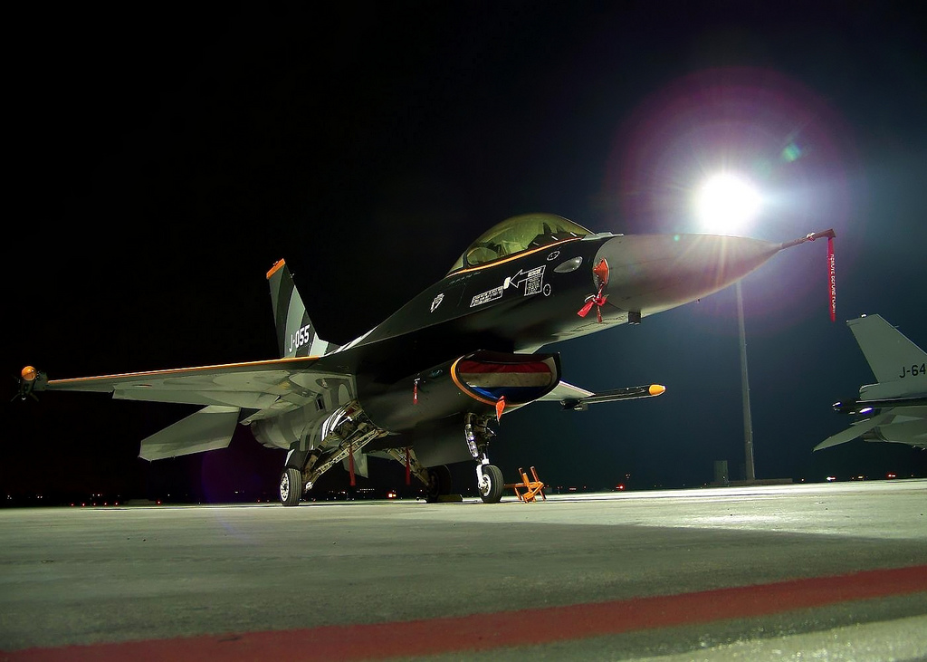 J-055 F-16AM Fighting Falcon fueza aerea holandesa Días antes de la Festa del Cel que se celebra en las fiestas de la Merce de Barcelona, España. F-16AM Fighting Falcon cn 6D-138 BCN / LEBL 2006 Septiembre 29